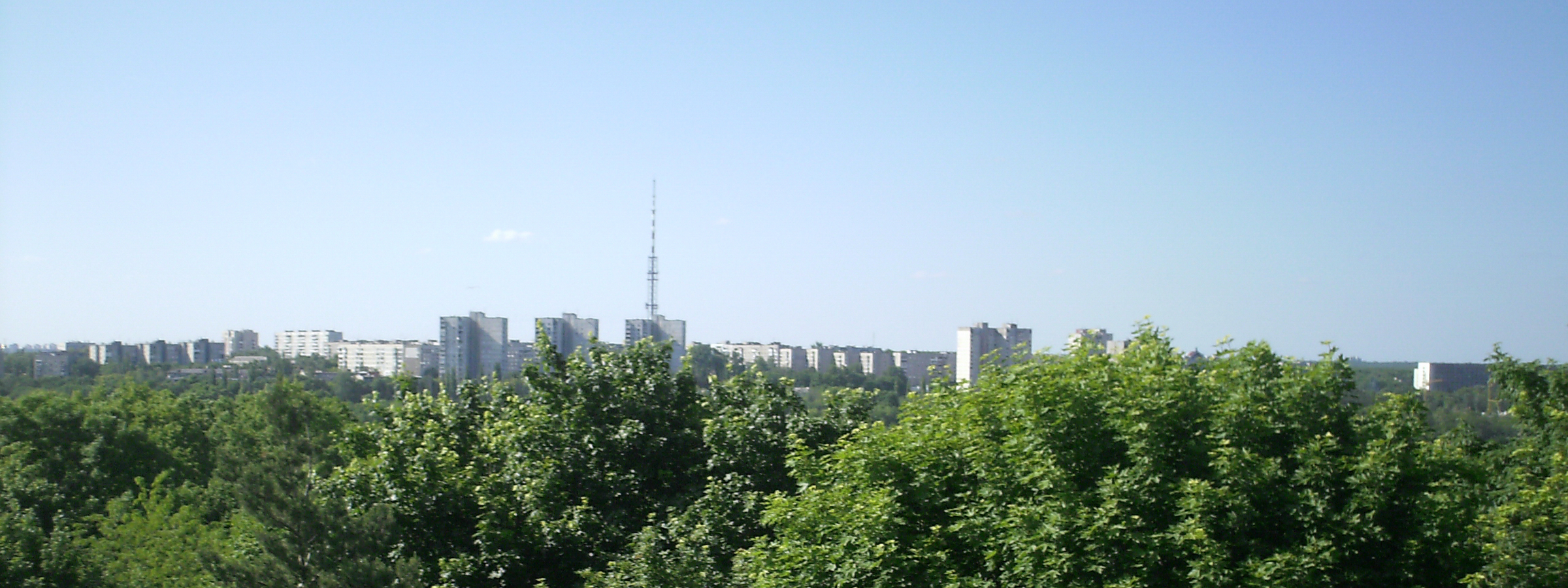 Харьков, вид с канатной дороги